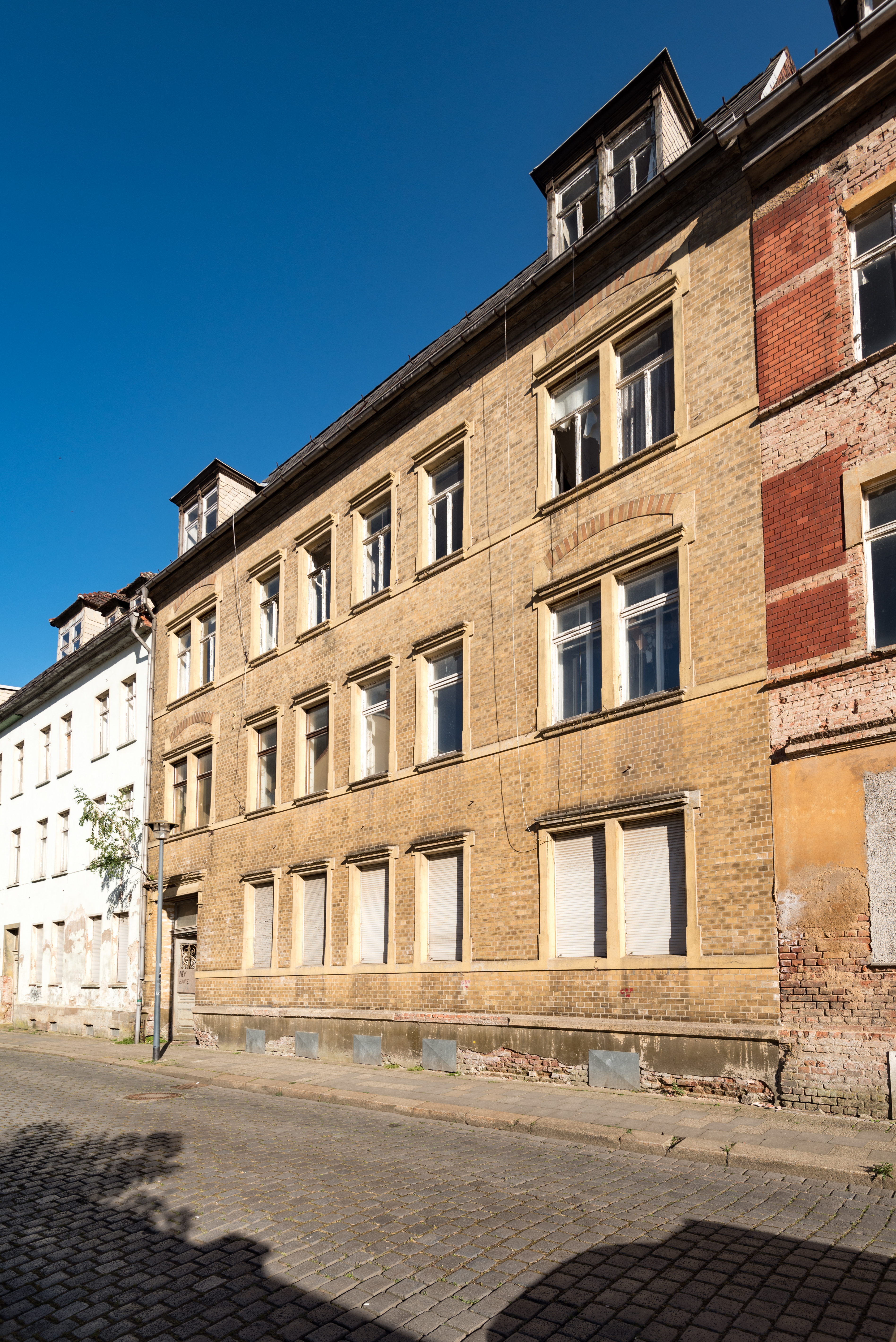 Weißenfels, Rudolf-Götze-Straße 12